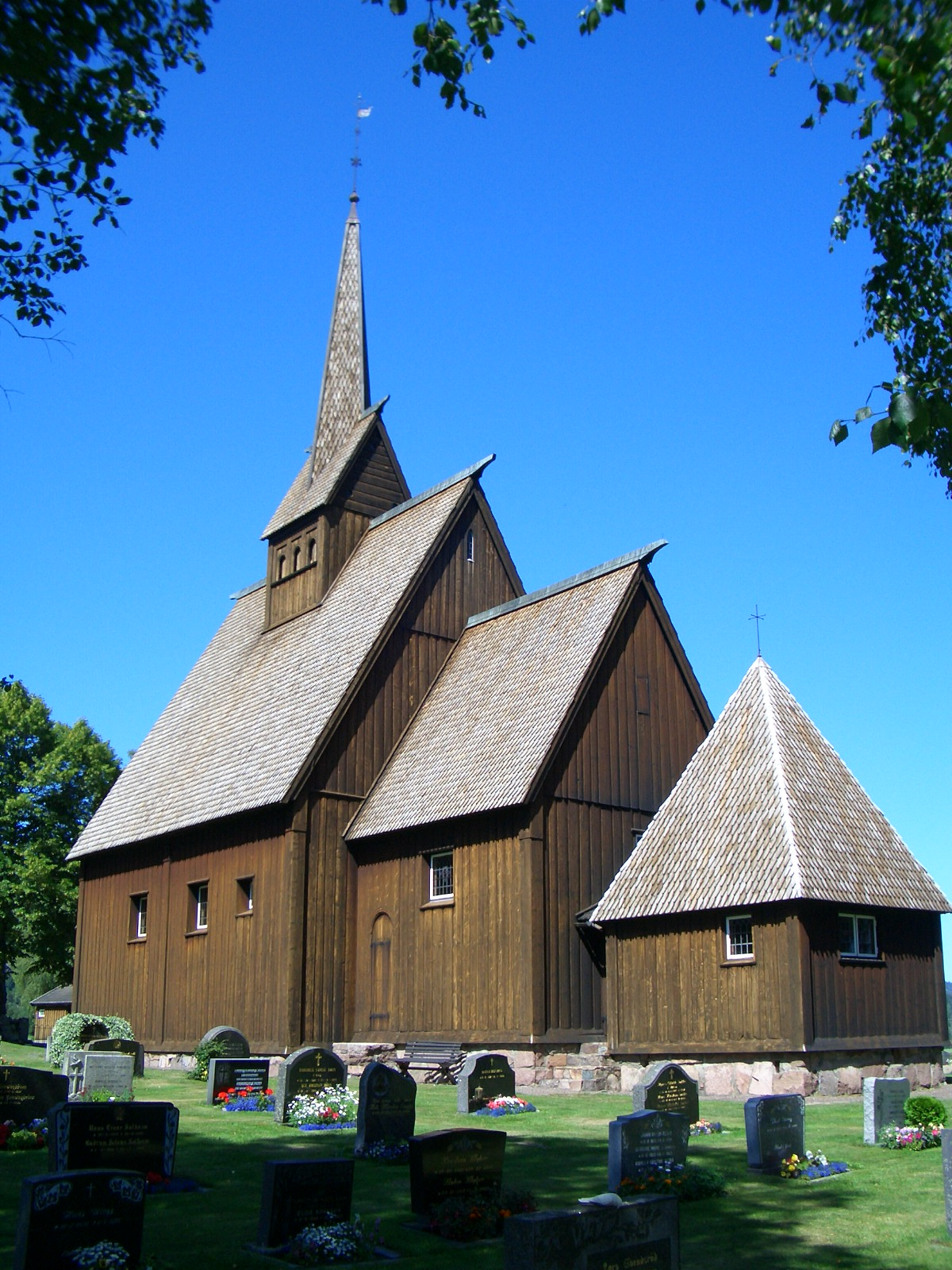 Høyjord stavkirke (Haugagerdis kirkja) står i Høyjord i Andebu kommune, Vestfold, Norge.